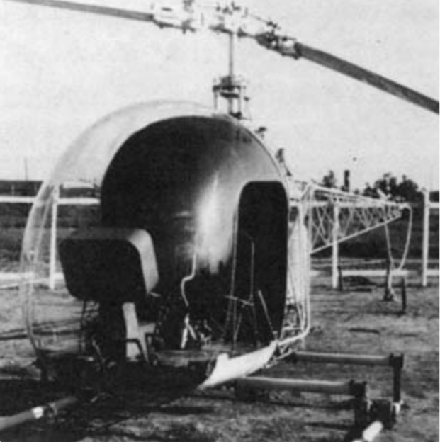 読売 Y-1（ヘリコプター）。日本ヘリコプター研究会が設計、 東京機械化工業その他が協力